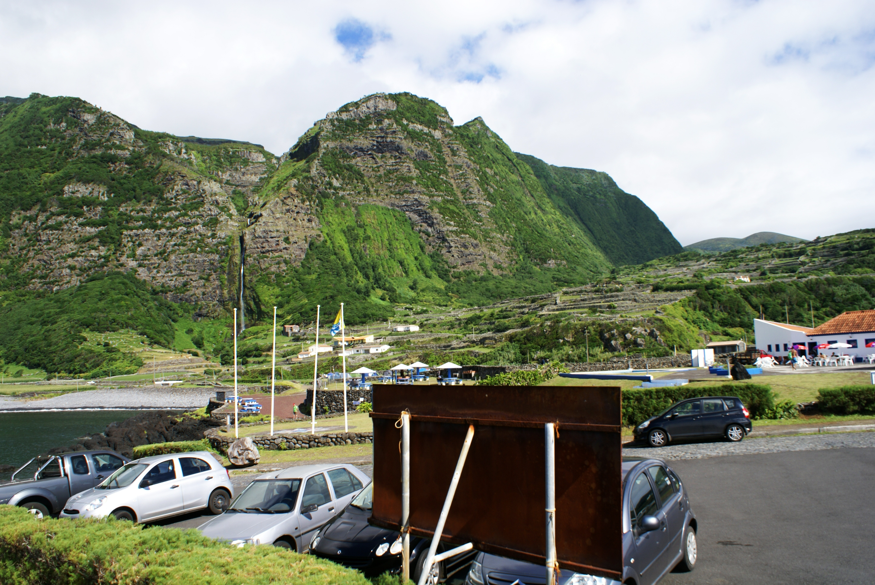 Porto e zona balnear da Fajã Grande, ilha das Flores, Açores, Arquivo de Villa Maria, ilha Terceira, Açores